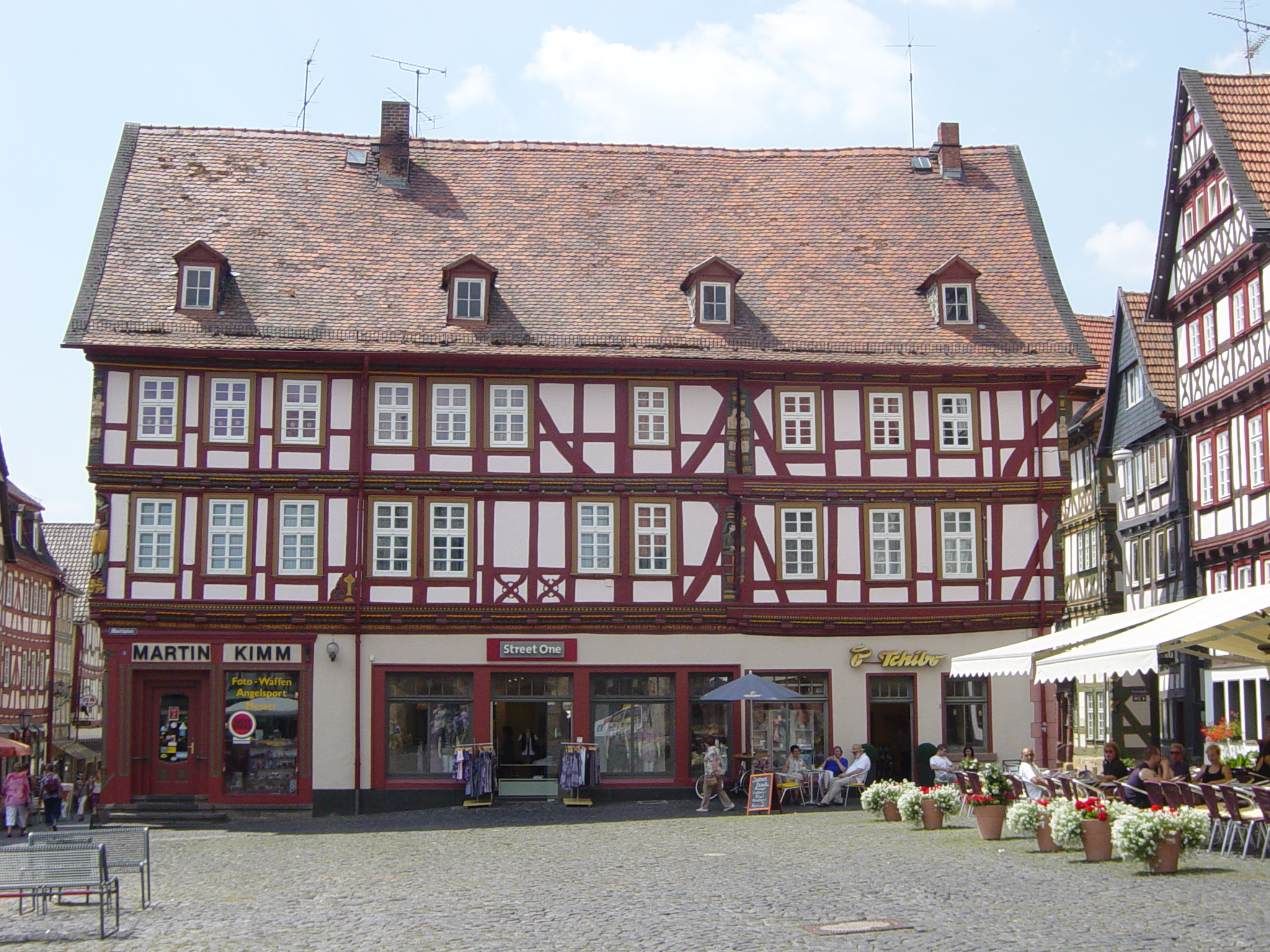 Stumpf-Haus, Alsfeld, "1609 an der Südwestseite des Marktplatzes erbaut und etwas später zur Rittergasse in ähnlicher Form hin erweitert. Das früheste Alsfelder Fachwerkhaus mit Schnitzwerk. Monumentales Schriftband an der Längsseite, an der Mainzer Gasse niedersächsische Fächerrosette, geschnitzte Eckpfosten, insbesondere an der linken Ecke der Bauherr Jost Stumpf in zeitgenössischer Tracht."alsfeld.de